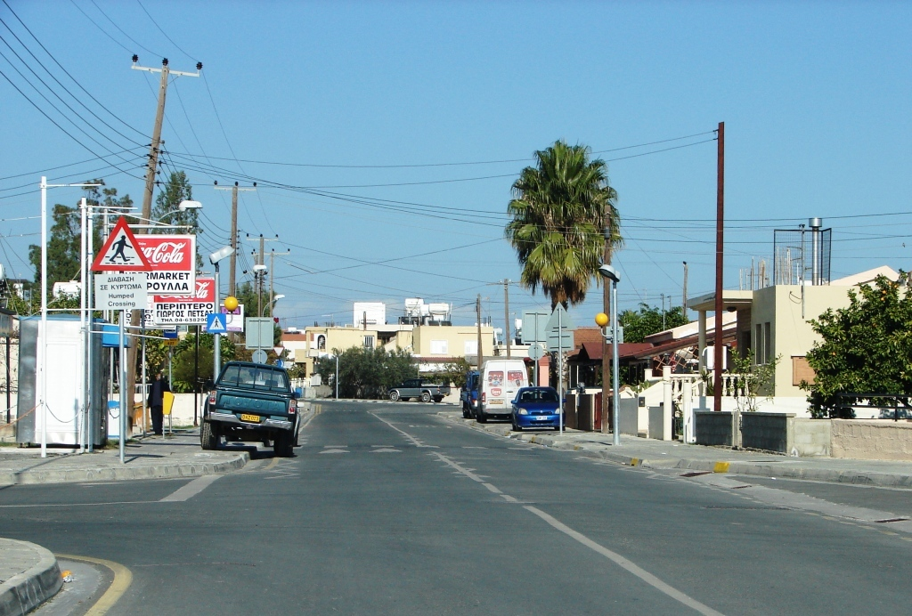 a@a Livadia area Cyprus